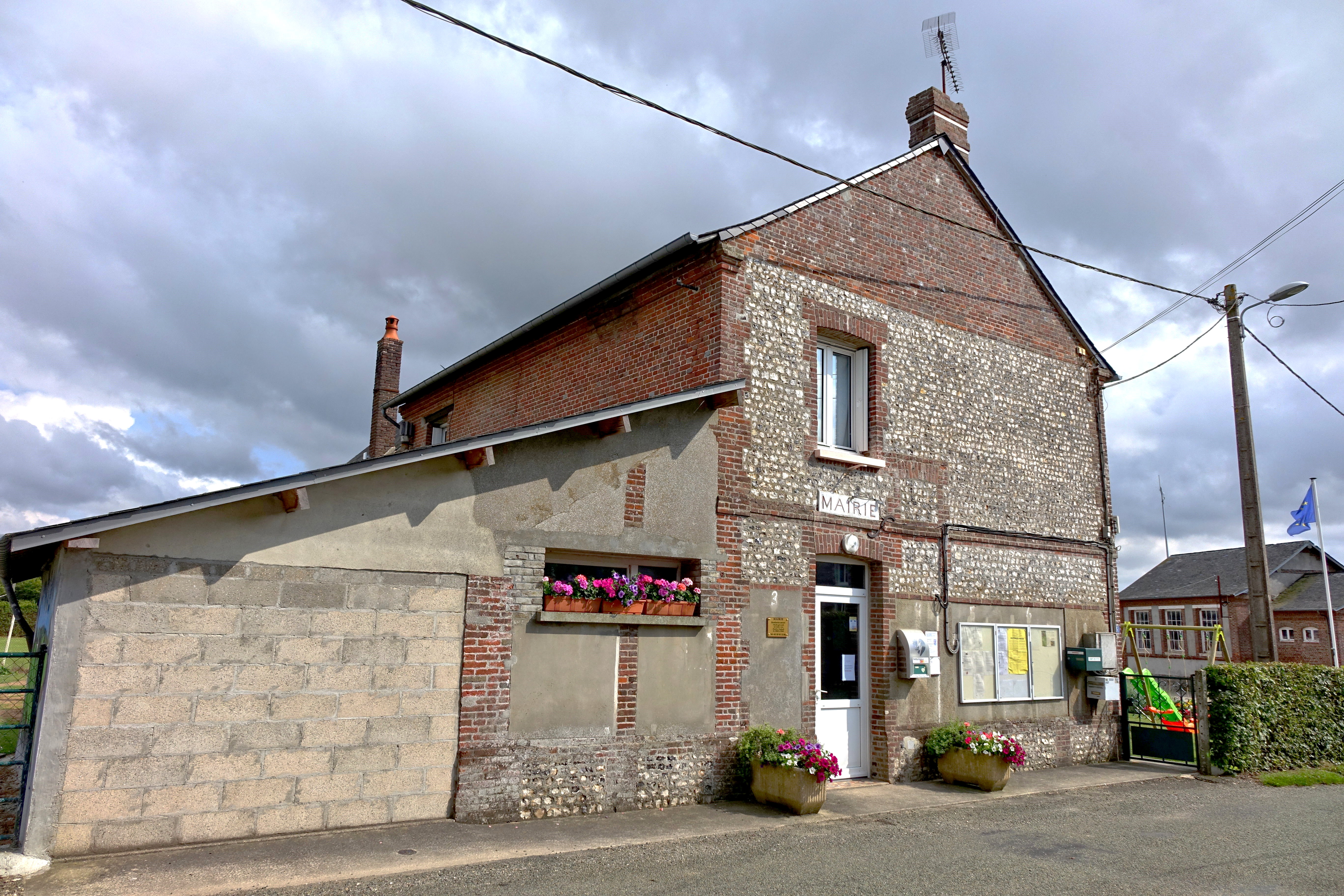 Mairie d'Ardouval, Seine-Maritime, France